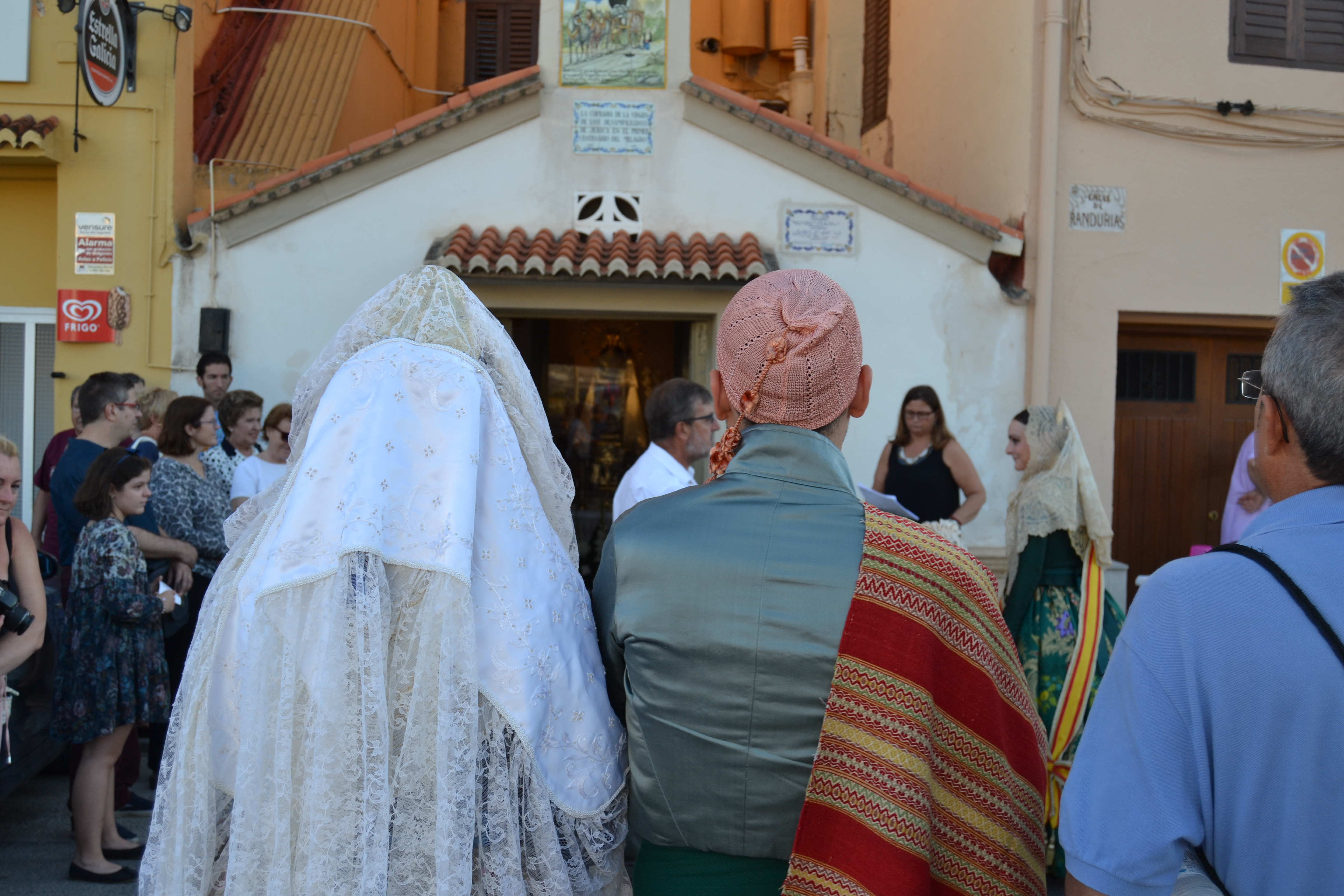 Pareja con traje regional valenciano frente a la ermita de la Virgen del Desamparados This is a photography of a Folklore festival in Spain (Wikidata id Q47128911).